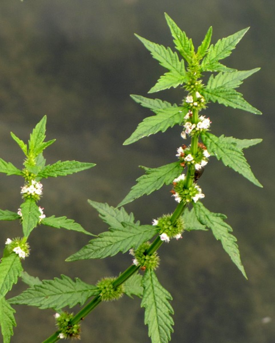 Navadni regelj ob Ljubljanici (Ljubljana).